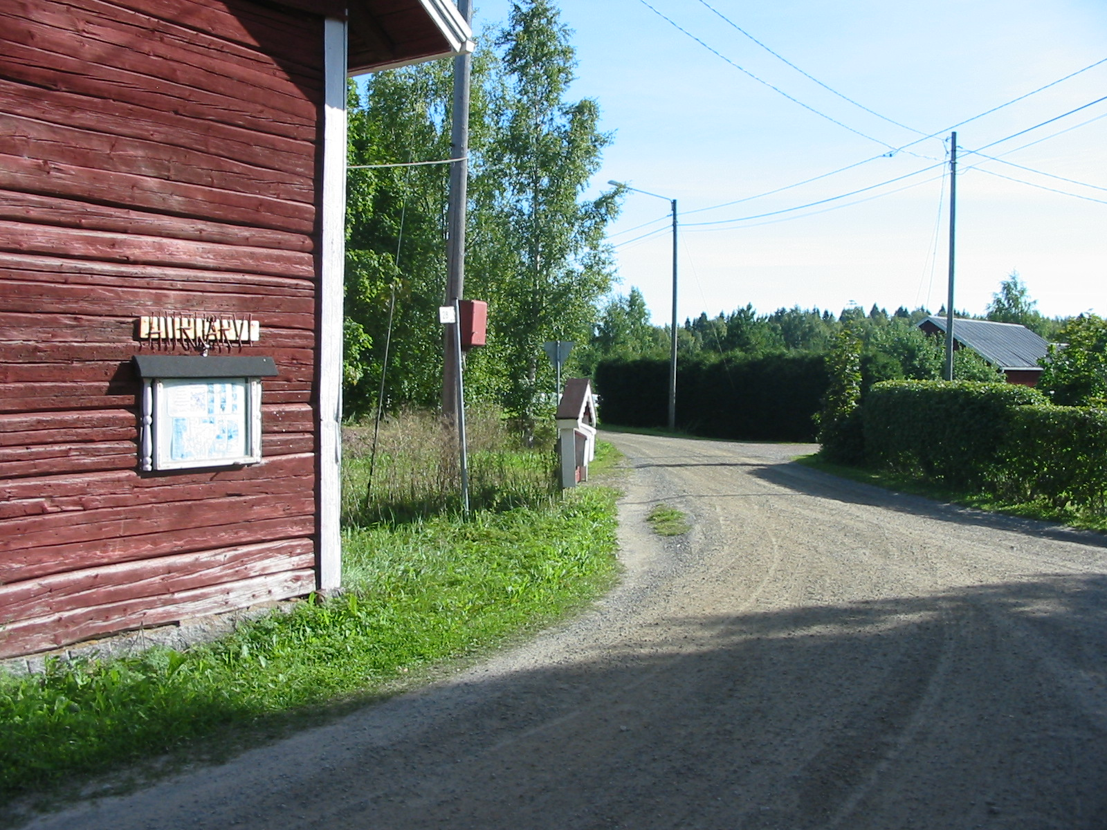 Hiirijärven kylänraittia Harjavallassa